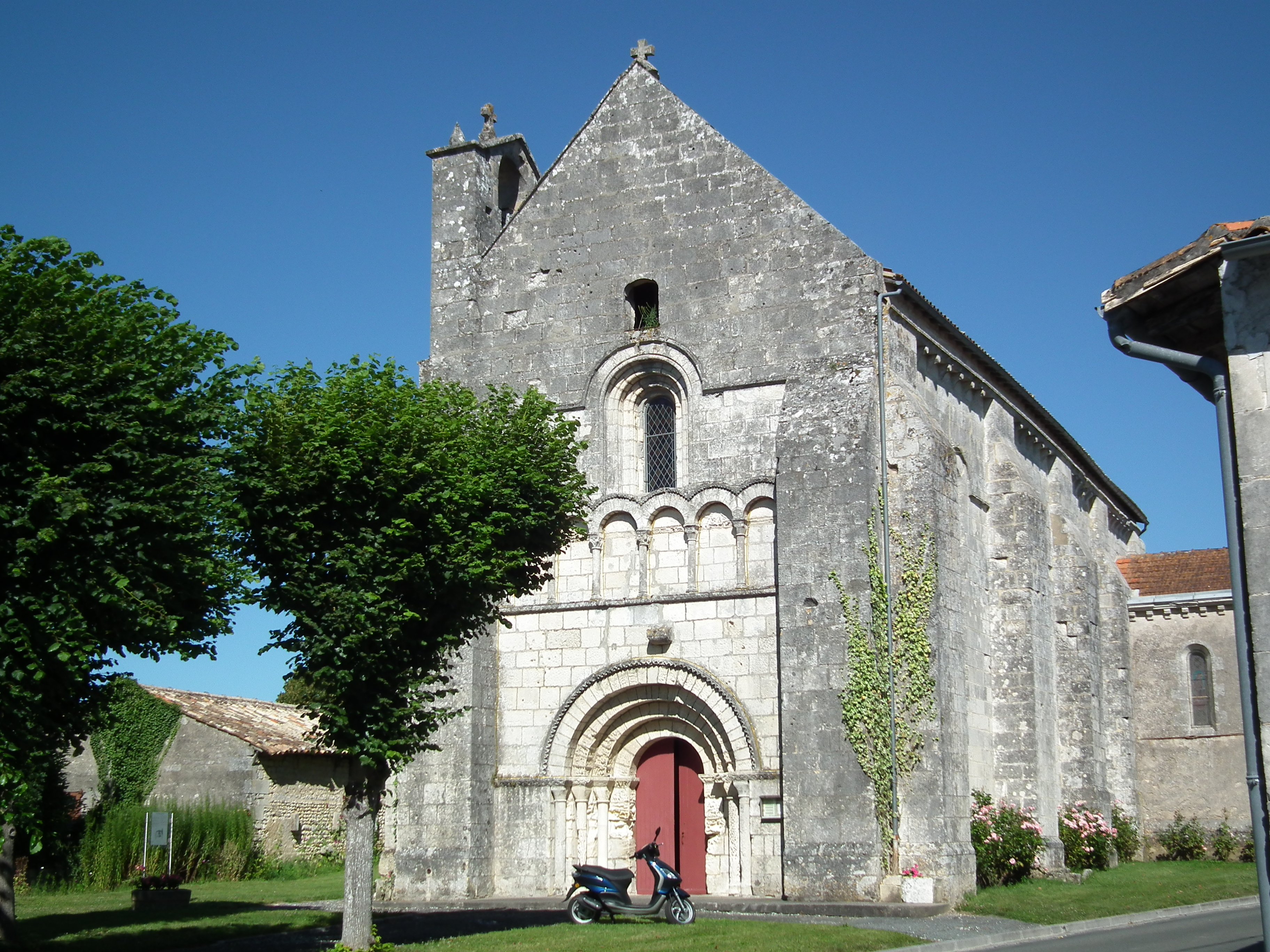 L'église de Saint-Simon-de-Bordes